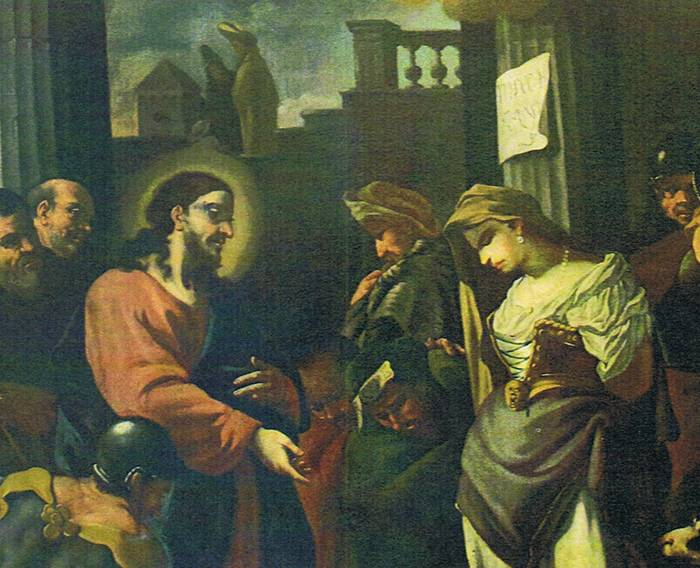 Cristo e l'adultera